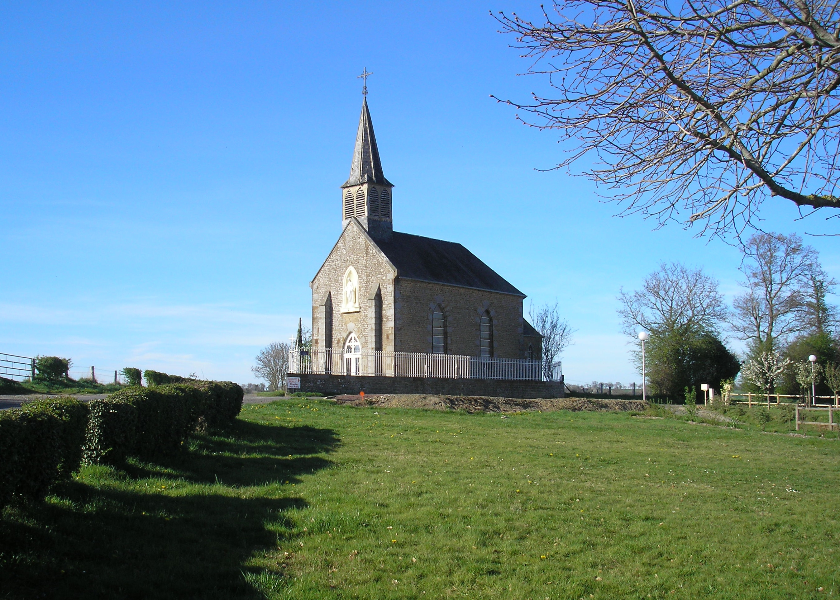 Montsecret (Normandie, France). La chapelle Notre-Dame-de-la-Salette.